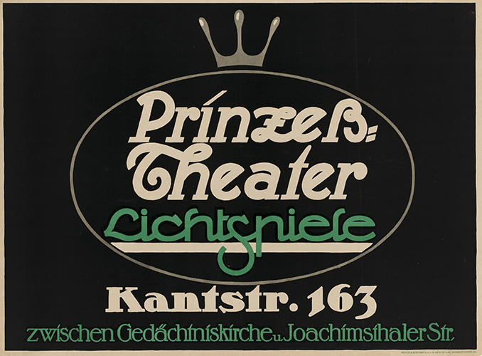 Von Beyer & Boehme im Jahr 1911 gedrucktes Plakat in den Maßen 69,8 x 95,2 cm für das Lichtspielhaus Prinzeß-Theater in Berlin, Kantstraße 163 „[...] zwischen Gedächtniskirche u. Joachimsthaler Str.“ ...